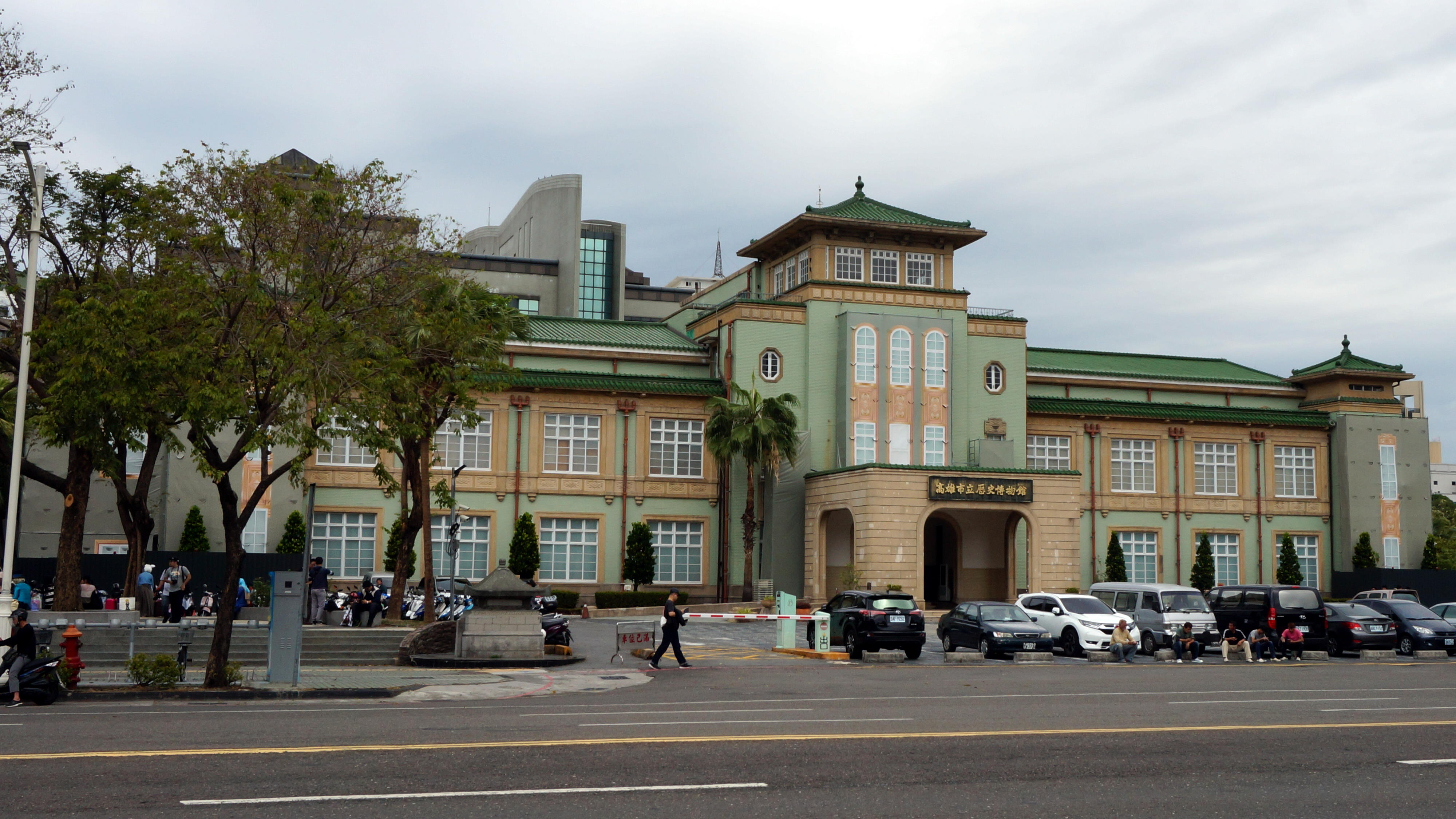 中文（台灣）: 高雄市立歷史博物館正面。